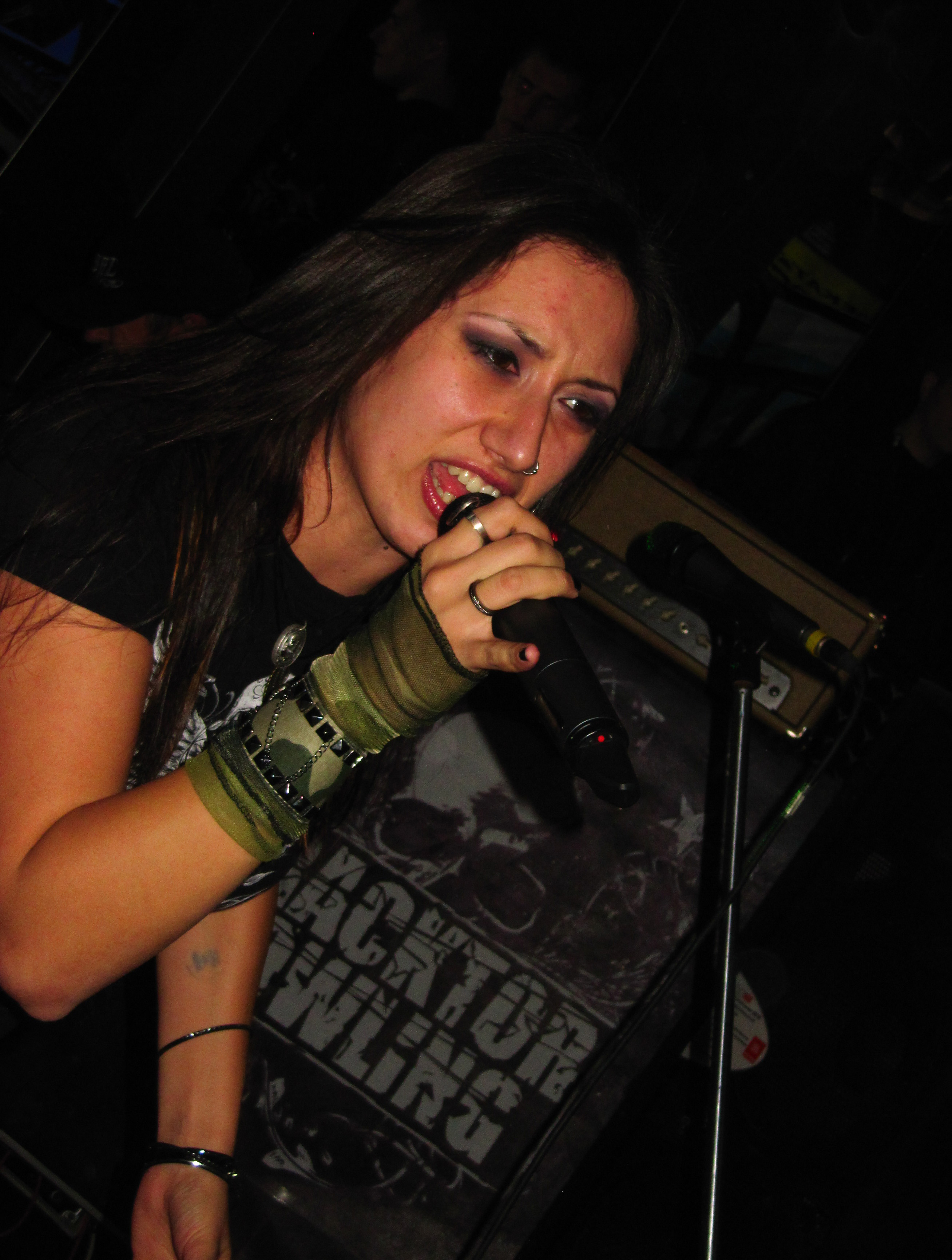 Лусинэ на концерте в Самаре в 2010